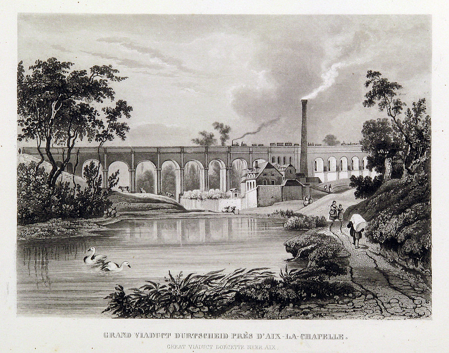 Grand Viaduct Durtscheid [sic] près d'Aix-la-Chapelle (Burtscheider Viadukt), Publié par Louis Bleuler au Chateau de Laufen près de Schaffhouse en Suisse (ca 1860?). 11.9 x 16.3 cm